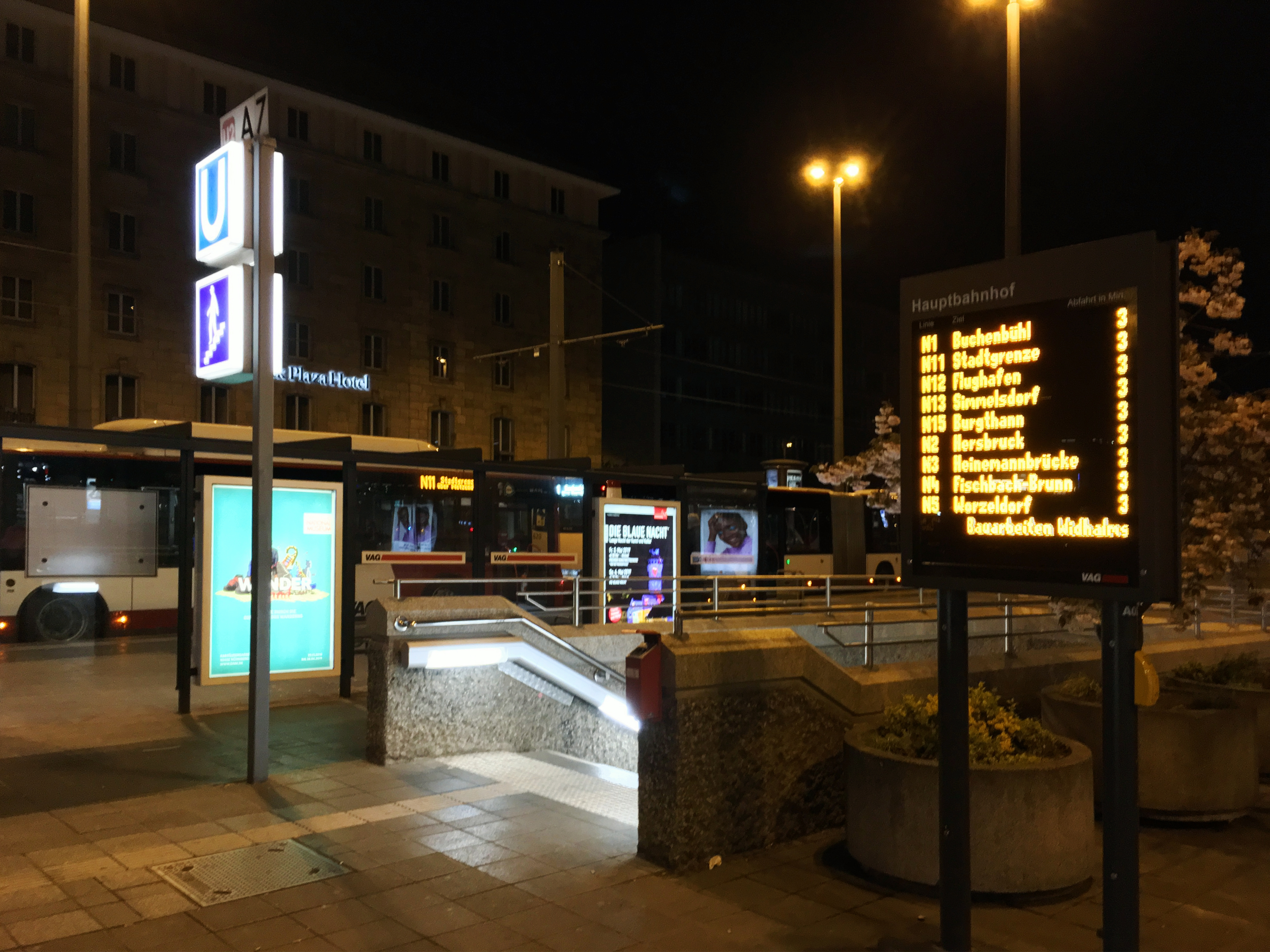 Nightlinerhaltestelle am Hauptbahnhof in Nürnberg